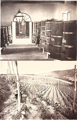 Cantine e vigneti a Villa Mosconi Bertani nel 1880